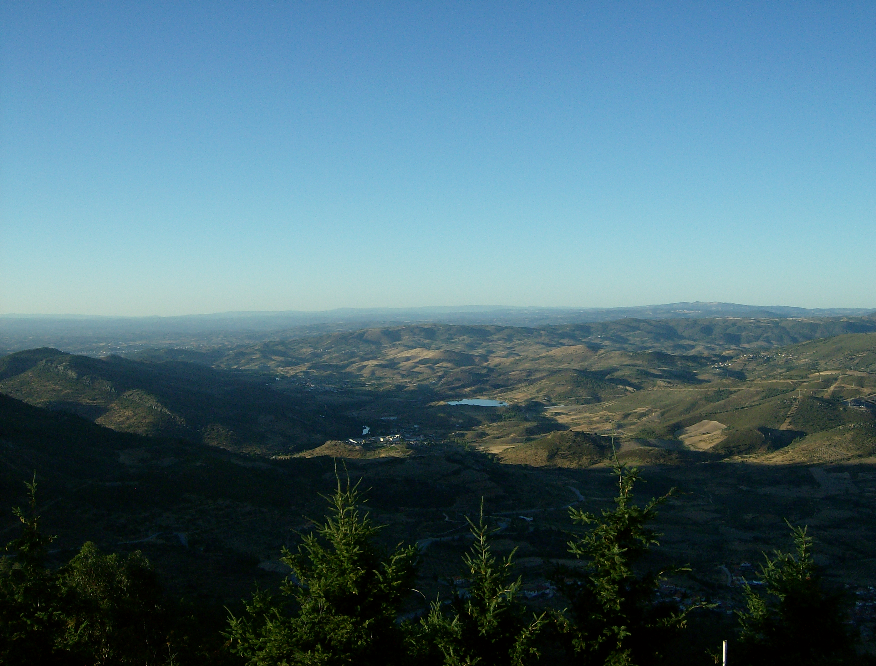 Vista panorâmica da Serra da Padrela - Trás-os-Montes